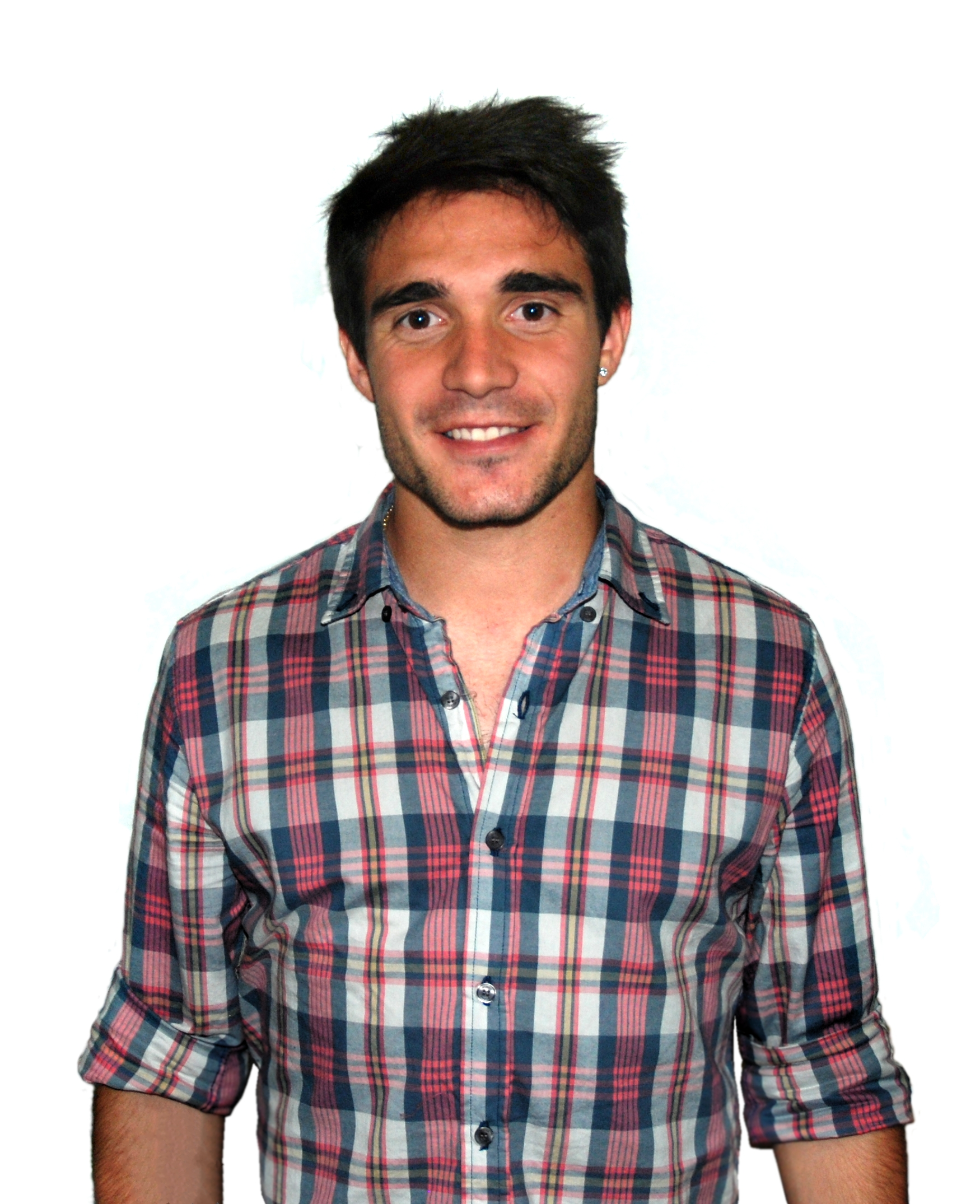 Ezequiel Cerutti (Junín, Argentina, 17 de enero de 1992). Futbolista profesional surgido del Club Sarmiento de Junín.